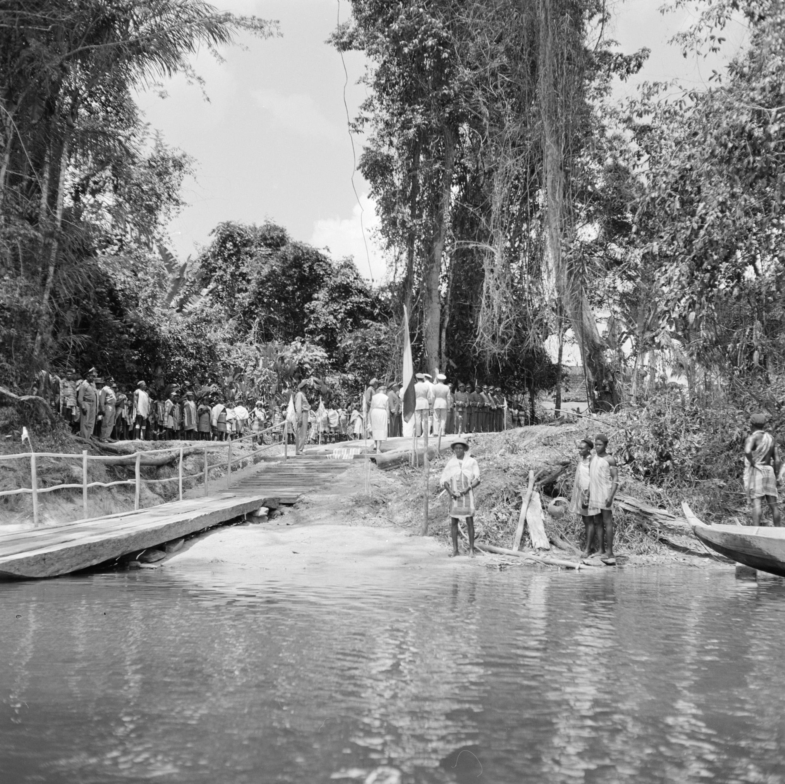 Collectie / Archief : Fotocollectie Van de Poll Reportage / Serie : Nederlandse Antillen en Suriname ten tijde van het koninklijk bezoek van koningin Juliana en prins Bernhard in 1955 Beschrijving : Aanlegsteiger bij Koffiekamp Datum : oktober 1955 Locatie : Koffiekamp, Suriname, Surinamerivier Trefwoorden : bezoeken, koninginnen, rivieren Fotograaf : Poll, Willem van de Auteursrechthebbende : Nationaal Archief Materiaalsoort : Negatief (zwart/wit) Nummer archiefinventaris : bekijk toegang 2.24.14.02 Bestanddeelnummer : 252-4353